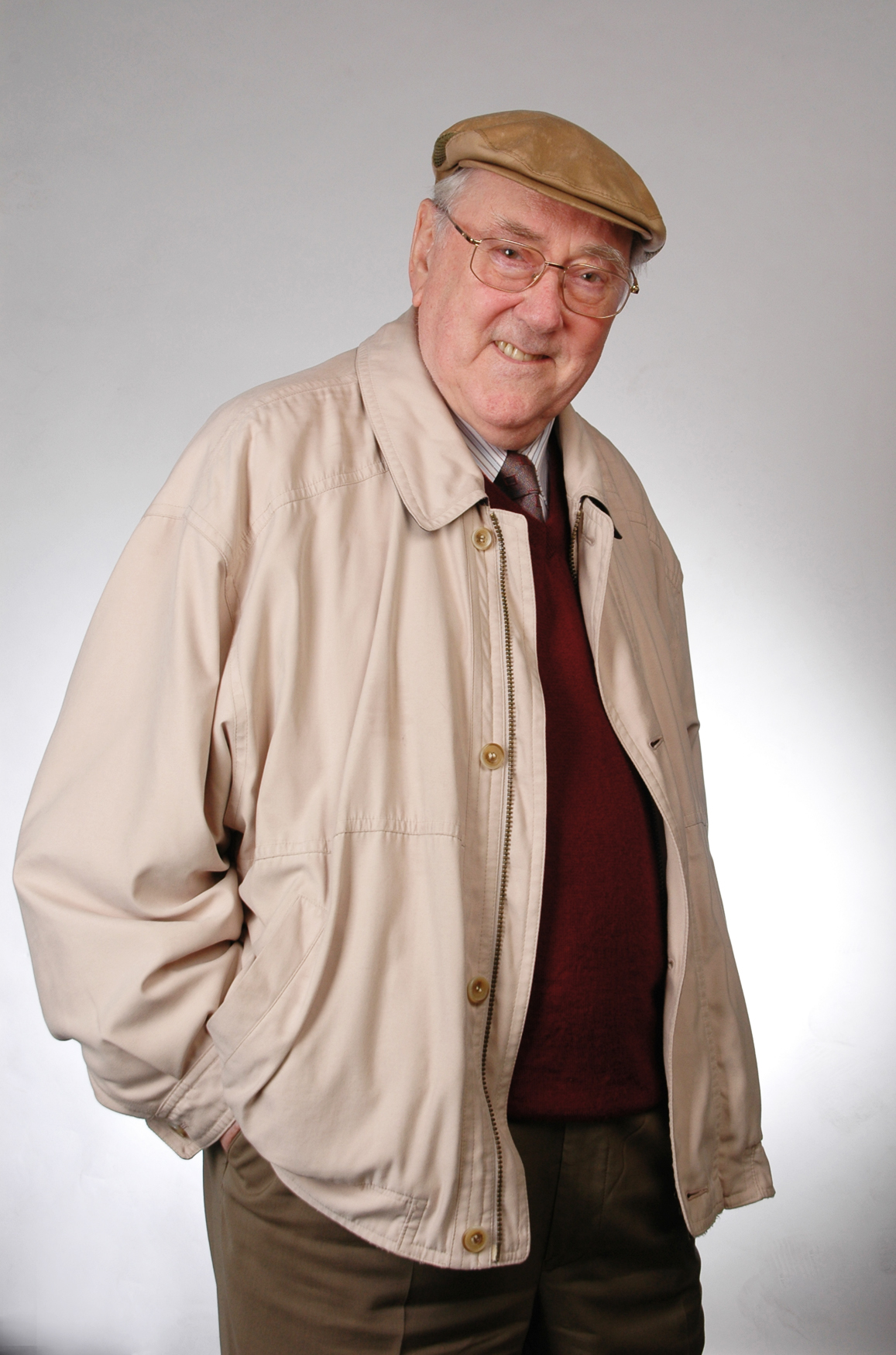 Karl-Heinz Drechsel im Studio.